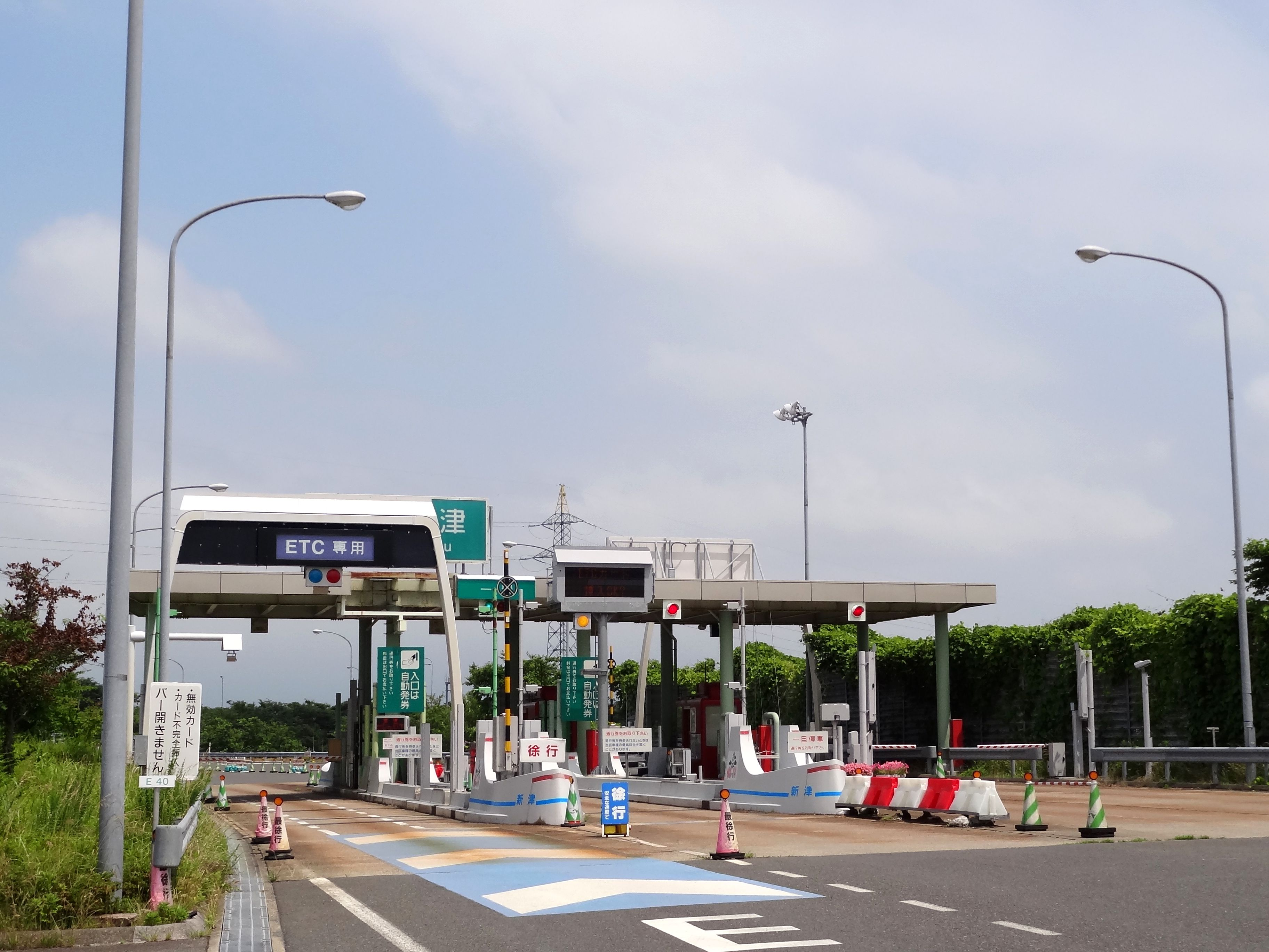 磐越自動車道 新津インターチェンジ（料金所付近）